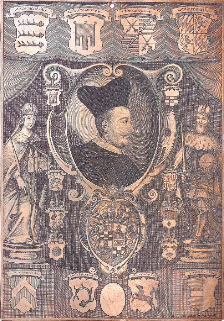 Kupferne Druckplatte aus dem 17. Jahrhundert mit einer Darstellung des Kemptener Fürstabtes Roman Giel von Gielsberg (1612-1673), Fürstabt von 1639-1673 Dieses Werk stammt aus der Kunstsammlung des fkm (freunde der kemptener museen e.V.) Der fkm wurde gegründet, um bedeutende Kunstwerke für Kempten zu erhalten, deren Ankauf durch den Etat der Museen nicht bewerkstelligt werden kann. In den Museen sind daher viele Stücke zu bewundern, die mit Hilfe des fkm und der finanziellen Unterstüztung seiner Mitglieder erworben werden konnten.